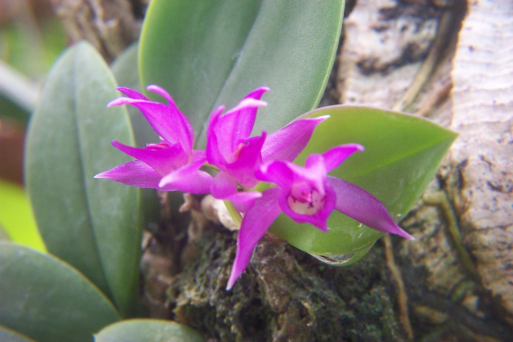 Meiracyllium trinasutum (Original: 537605770_3a1efffd64_b.jpg)